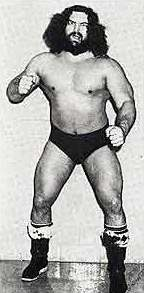 Bruiser Brody sur le programme de Big time Wrestling le 6 mars 1977.